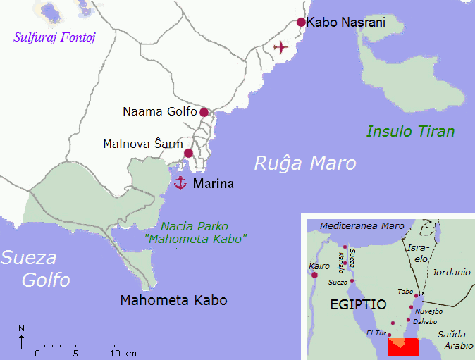 Priskribo